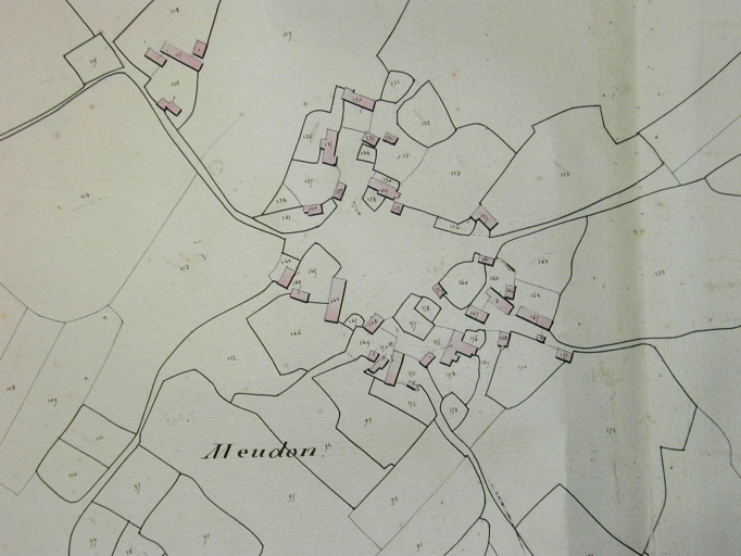 Plan cadastral du village de Meudon, Vannes. Plan aquarellé.